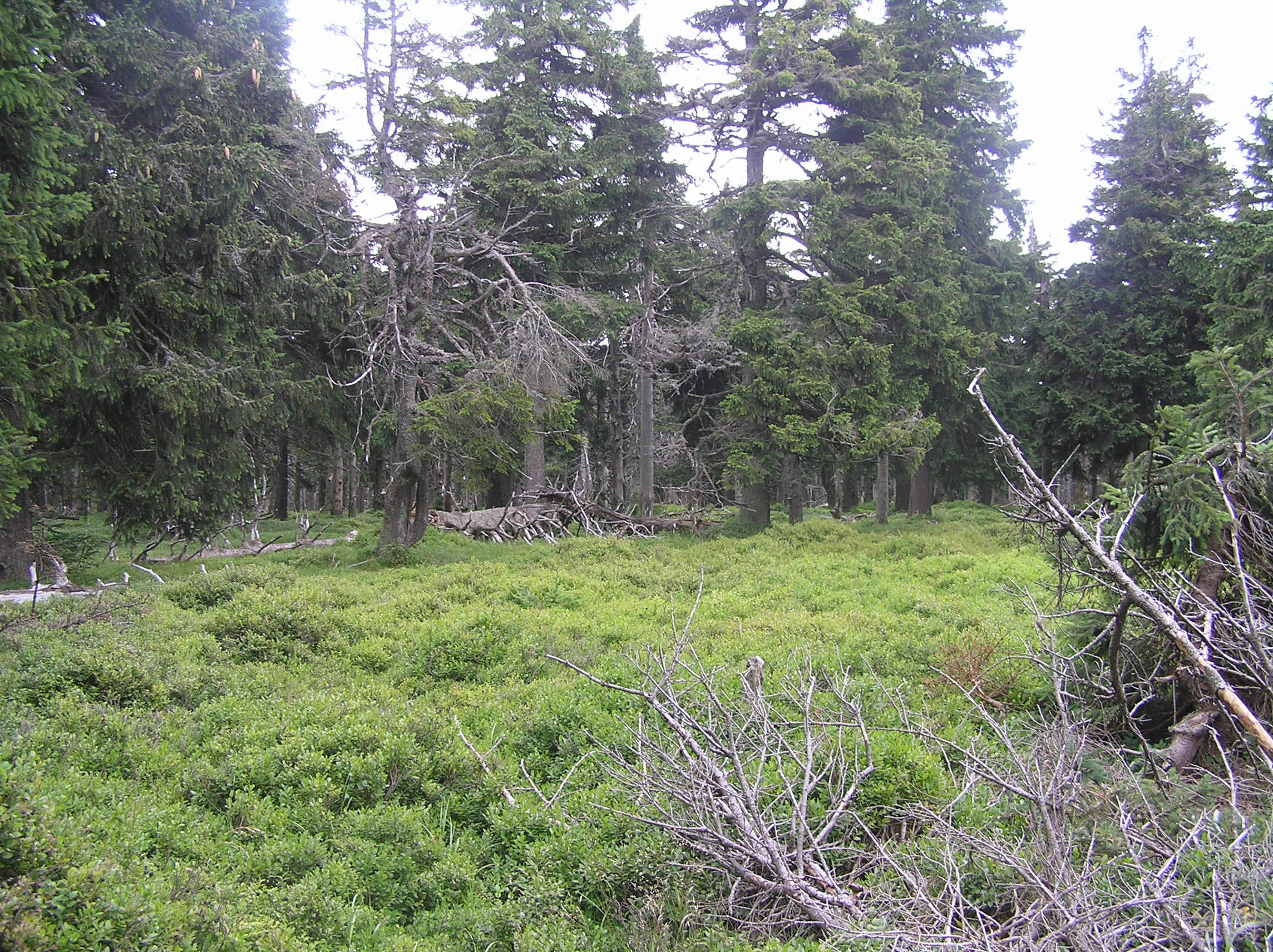 Černá Kupa (1295 m) is the mountain near the the town Králíky, the Králický Sněžník Mountains, Czech Republic